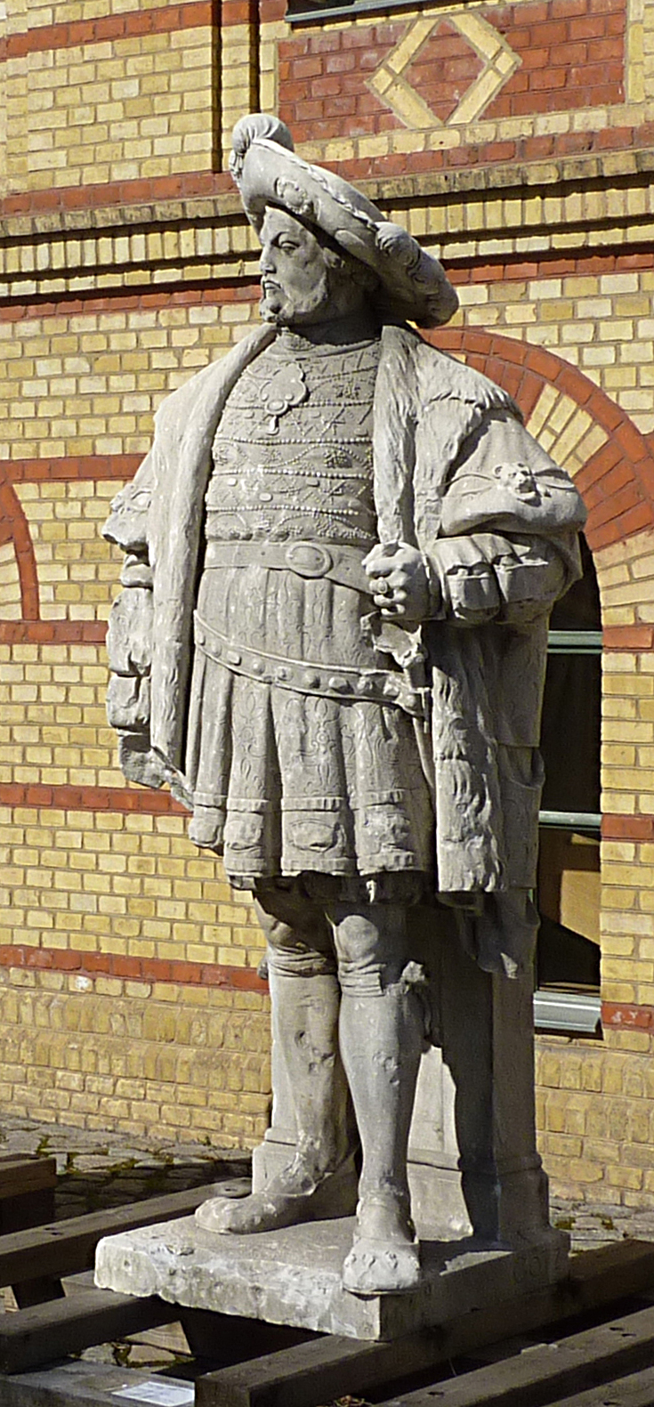 Siegesallee Gruppe 19 Joachim I Nestor, enthüllt 1900, Plastiker Johannes Götz, Standort zZ Zitadelle Spandau